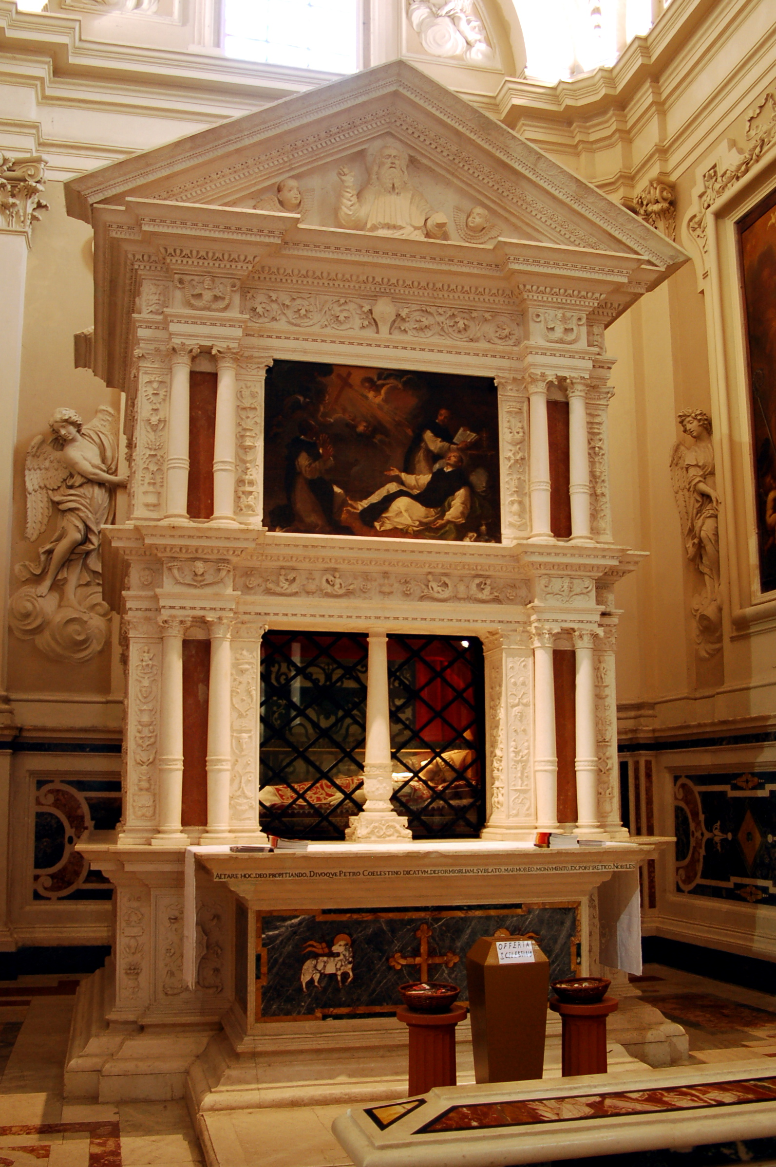 Tomba di Papa Celestino V nella Basilica di Santa Maria di Collemaggio a L'Aquila